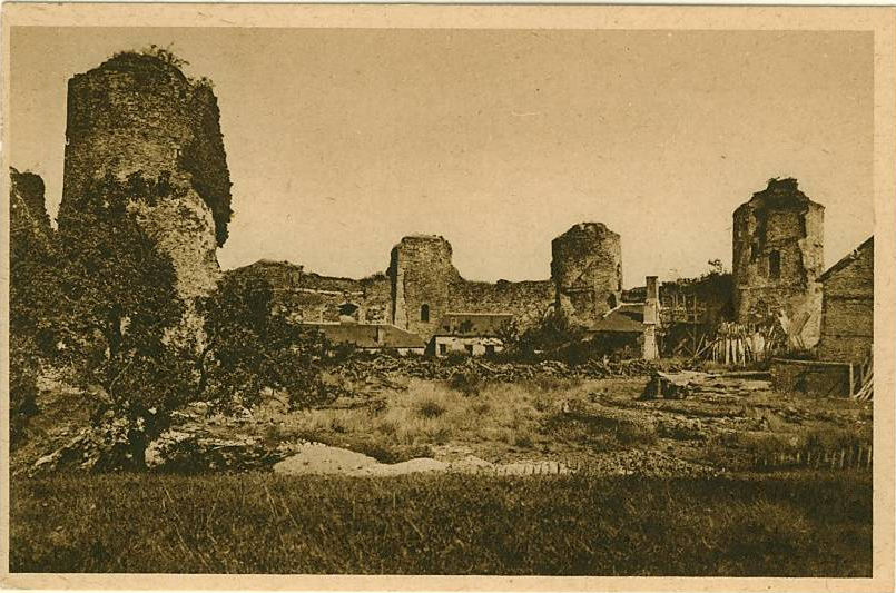 Intérieur du château médiéval de Pouancé dans les années 1900-1916, avant l'éboulement de la tour du Moulin (à droite) et de la tour Criminelle (à gauche).